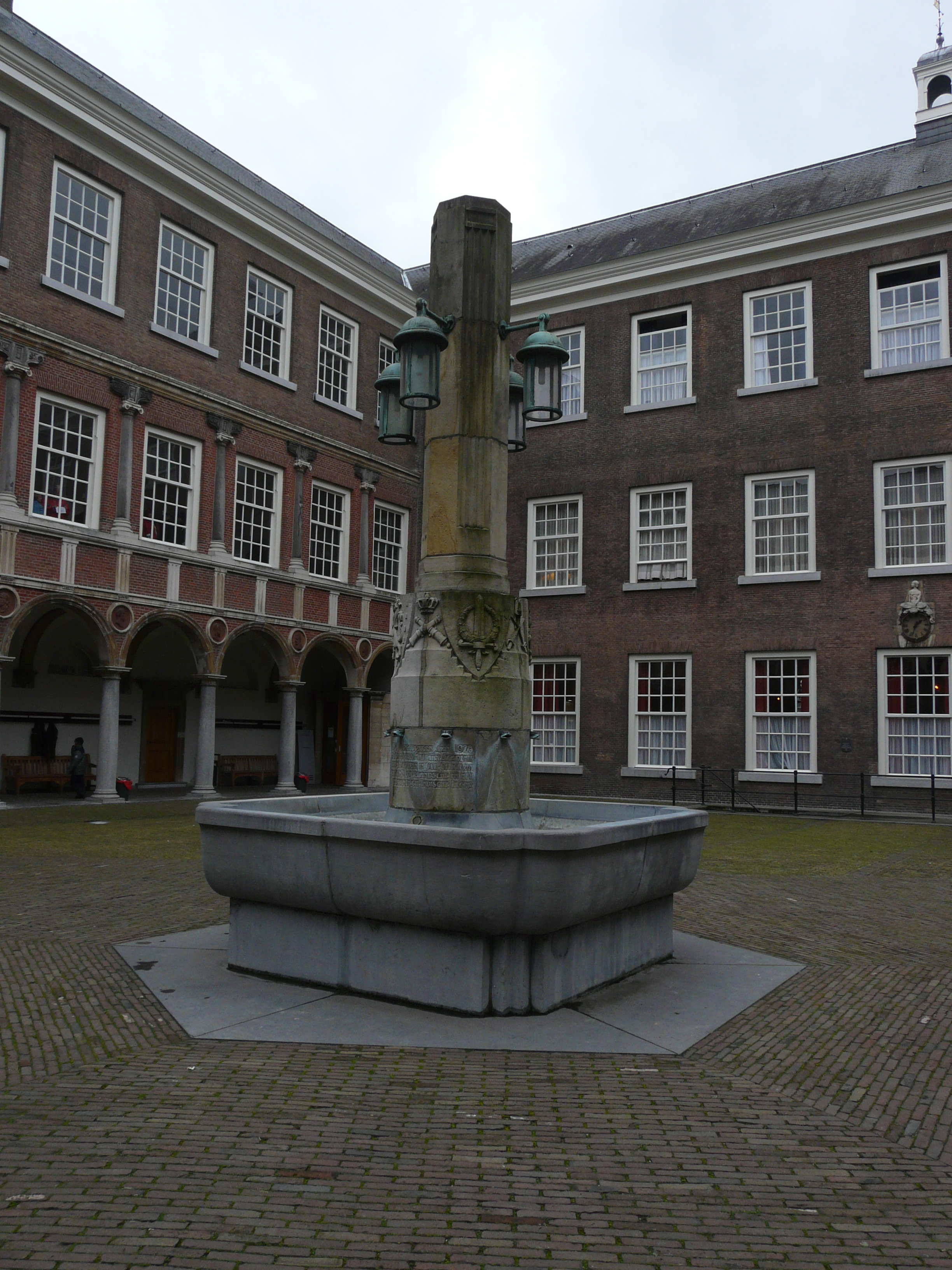 Binnenplaats van het Kasteel van Breda in Breda Centrum in Breda